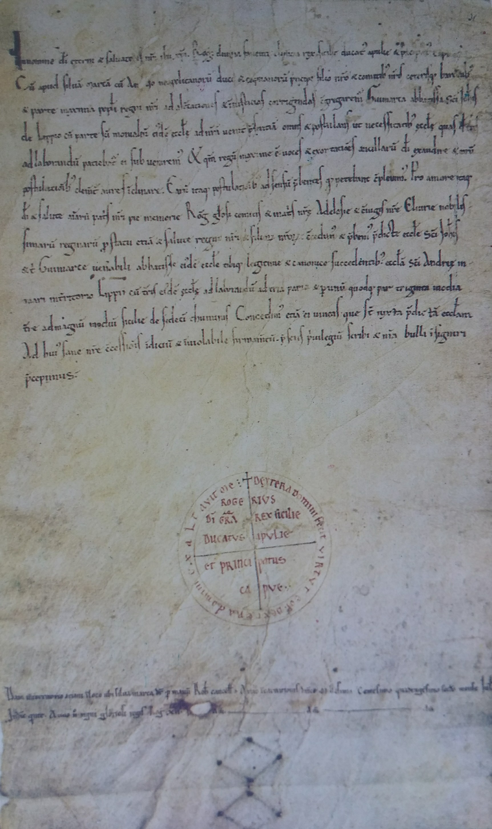 Diploma di re Ruggero II - Assemblea di SilvaMarca